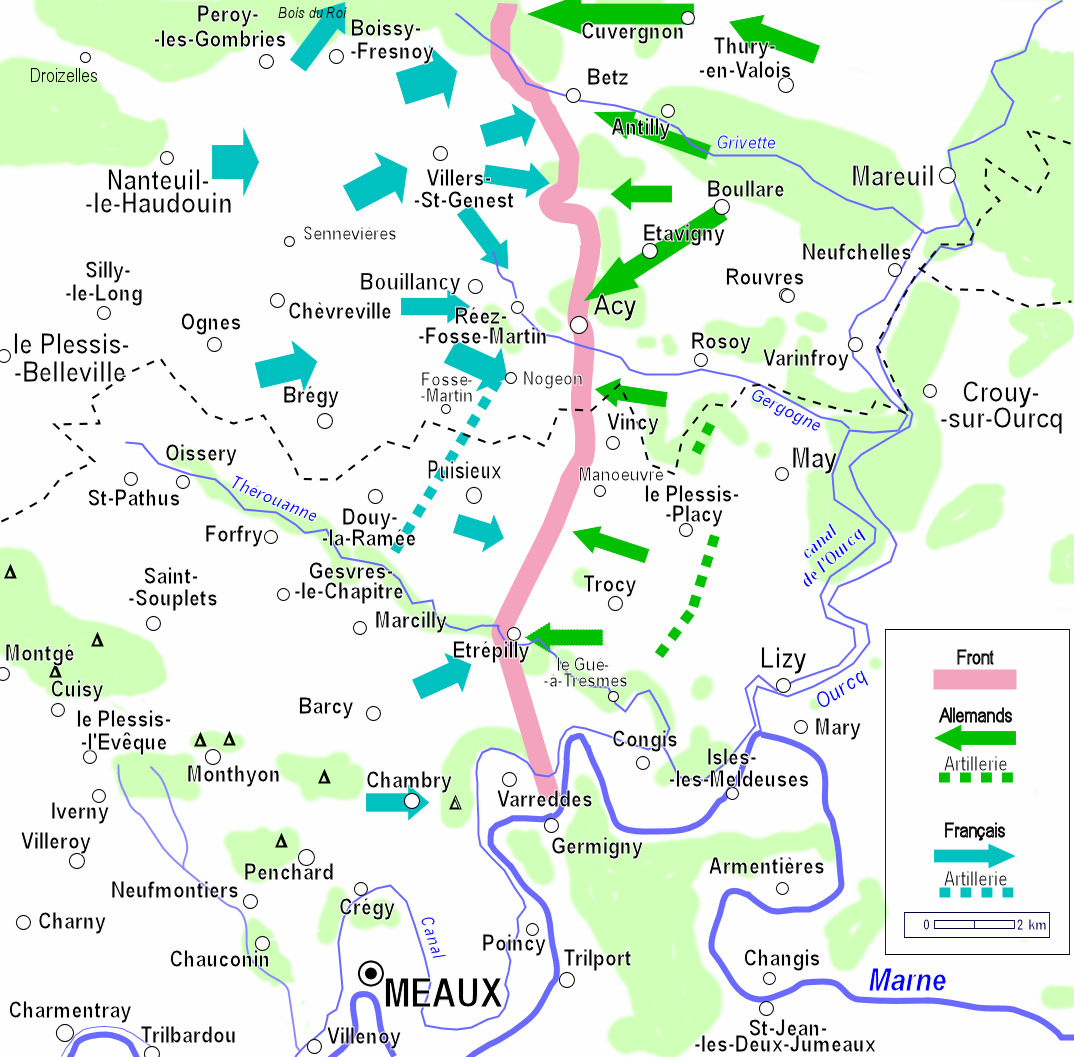 Ligne de front au 8 septembre